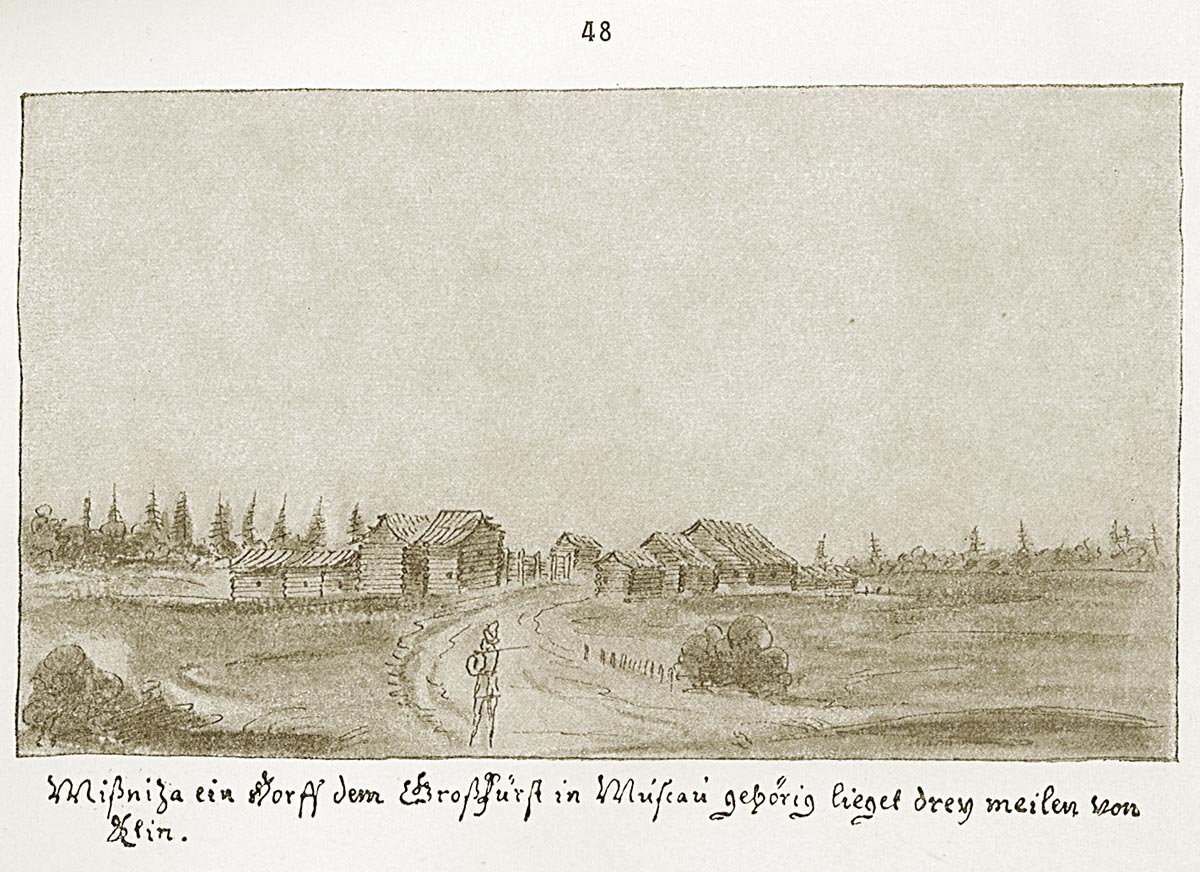 Мошницы